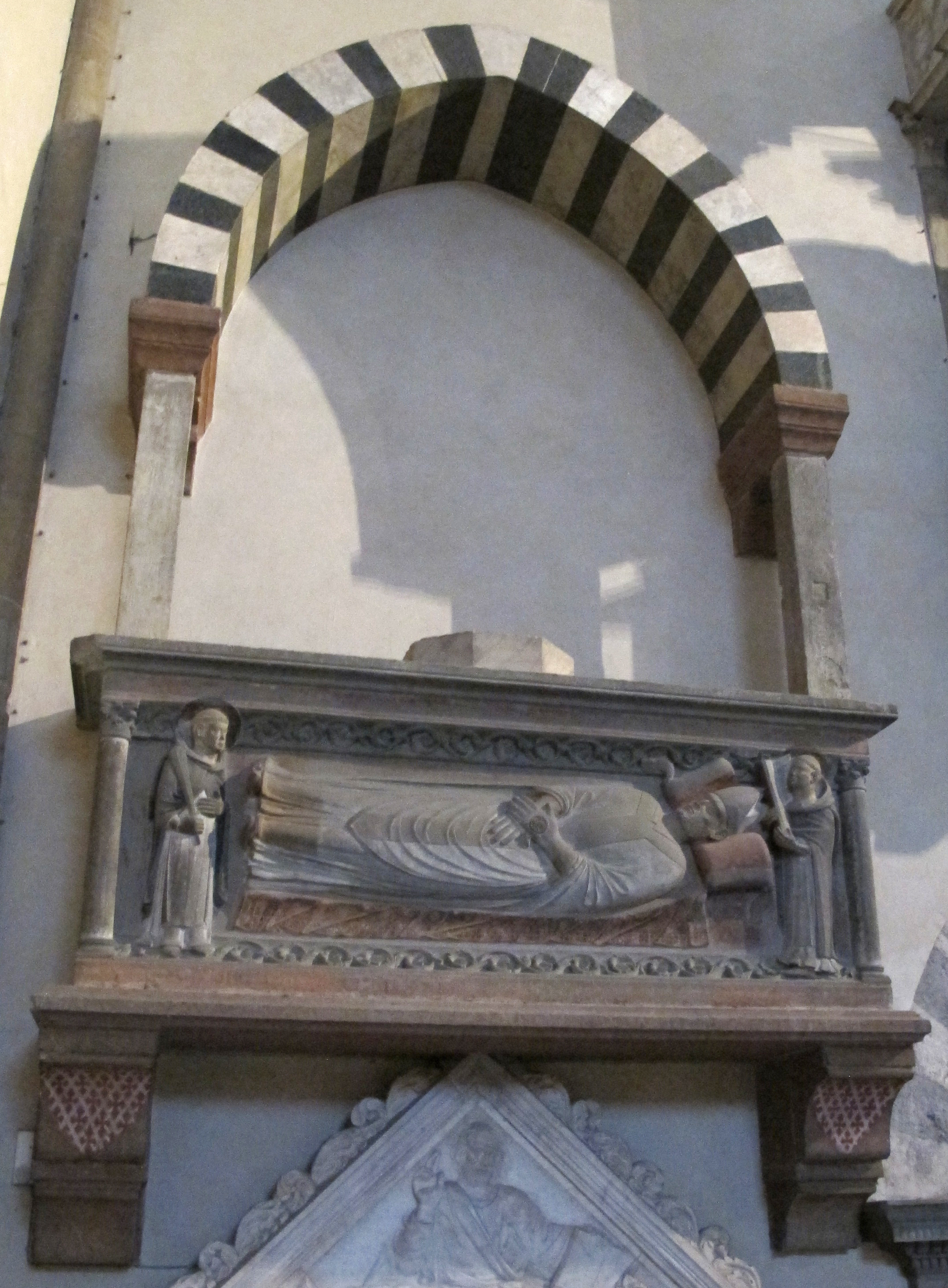 Smn, transetto dx, monumento ad aldobrandino cavalcanti, vescovo di orvieto, 1280-90